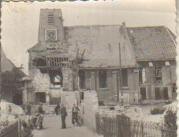 Kerk in Bleskensgraaf, gemeente Graafstroom, na het bombardement op 12 mei 1940